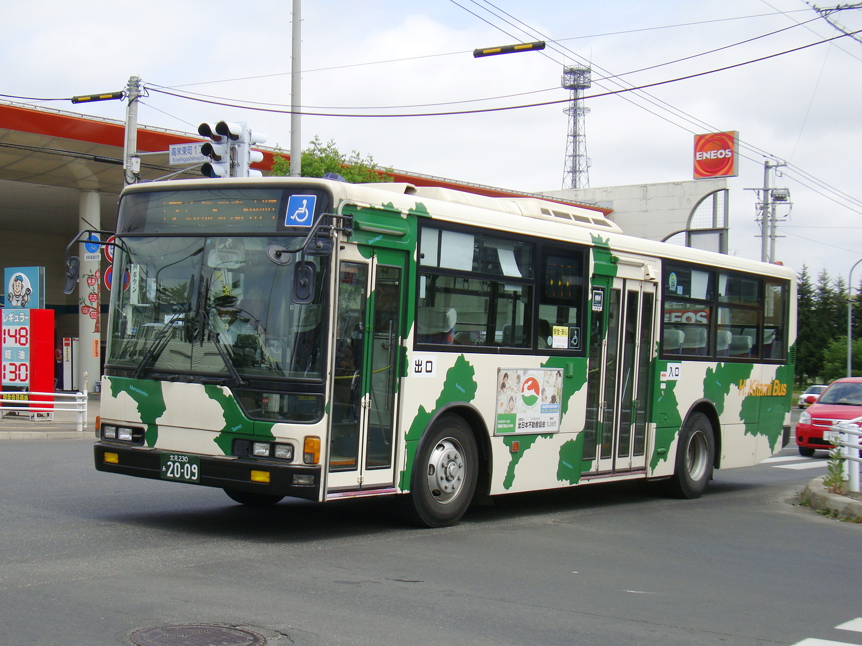 Kitami city line